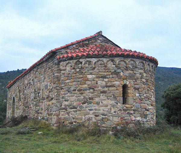 Categoria:Catalunya del Nord Foto digital de l'ermita de santa eulàlia, al poble nord-català d'Arboçols de Conflent.